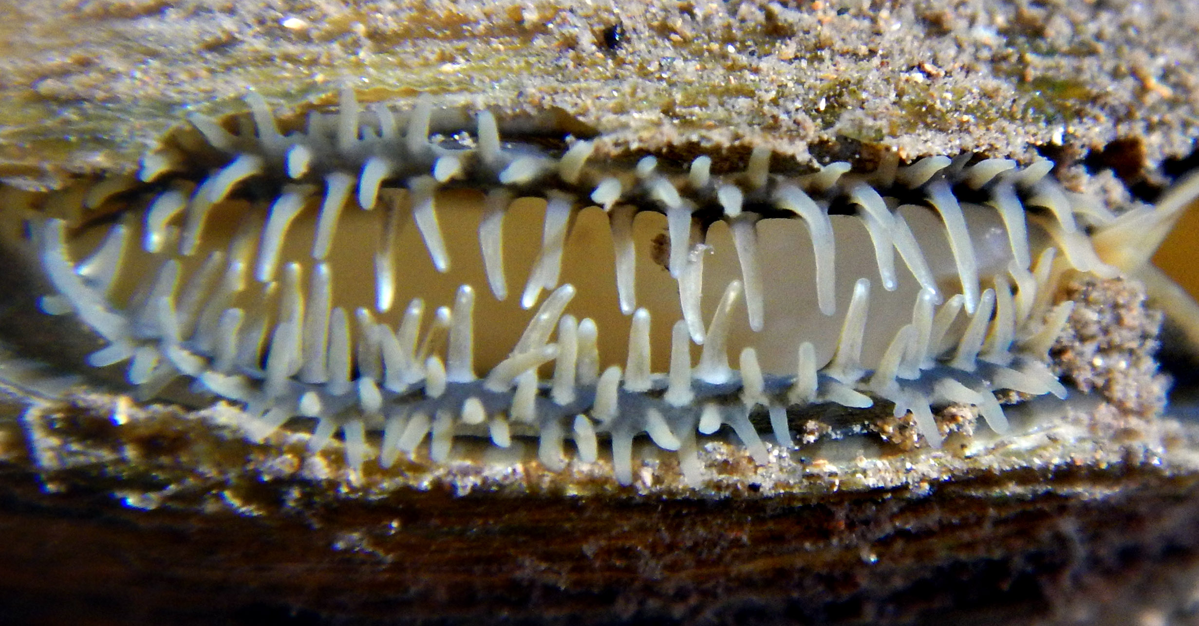 Mollusque bivalve de la famille des Unionidae, ici observé dans un ruisseau étroit reliant deux pièces d'eau d'un jardin public du Nord de la France (fin juillet 2014). Les siphons inhalant et exhalant sont bien visibles. Longueur de la coquille : 8-9 cm